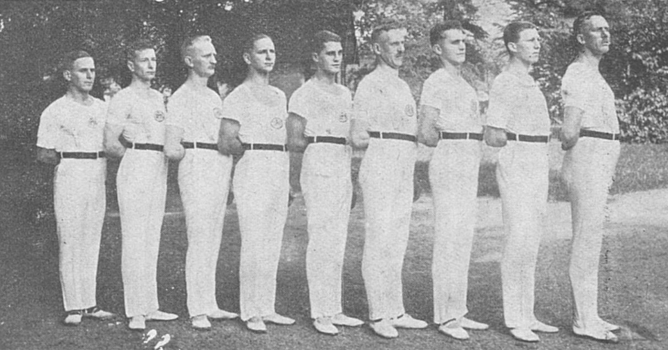 Spitzenturner der Hamburger Turnerschaft von 1816 im Jahr 1926